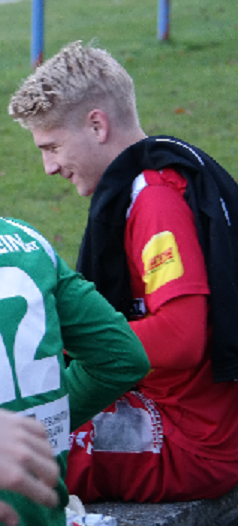 Sebastian Feyrer